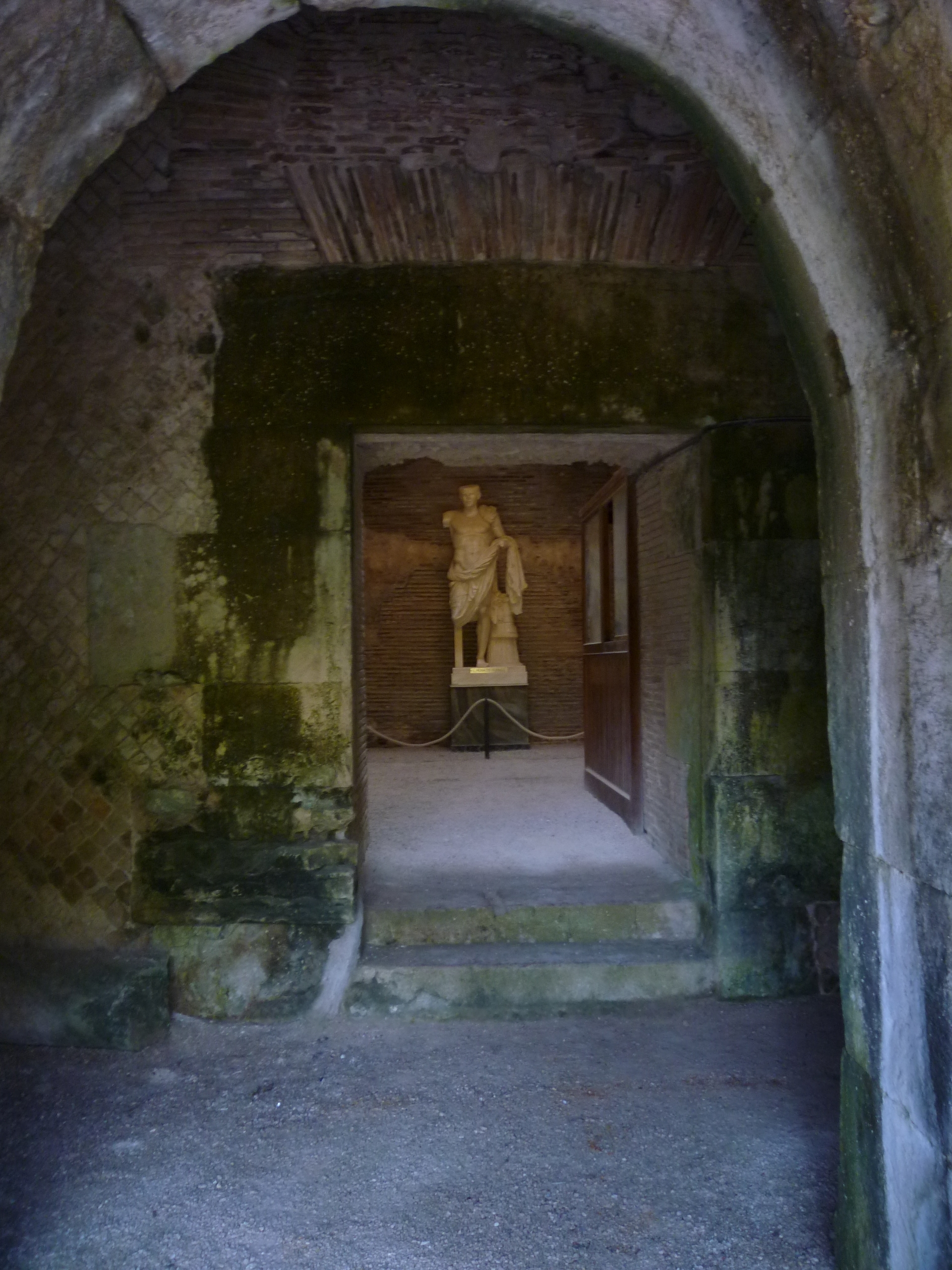 Gaeta, Italy: Mausoleo di Lucio Munazio Planco (part. interno)